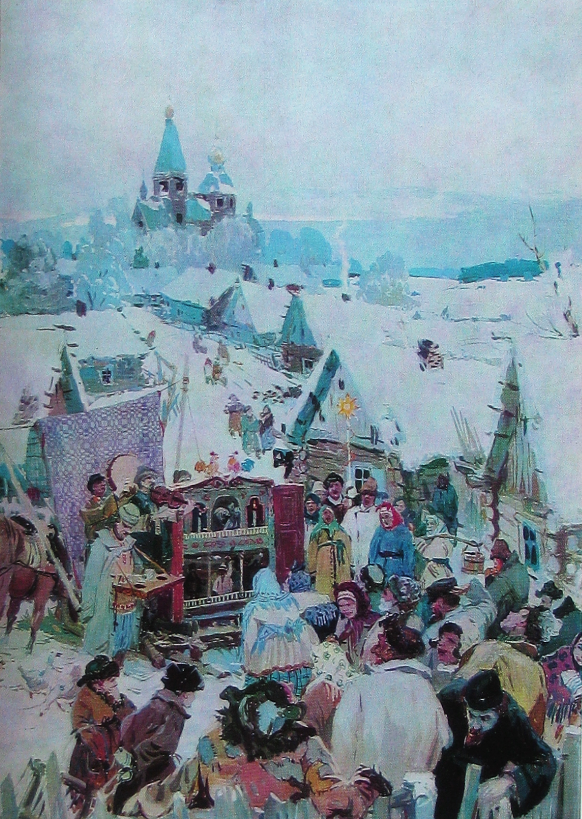 Міхаіл Блішч. Беларускі тэатр Батлейка. Гуаш 81 х 59